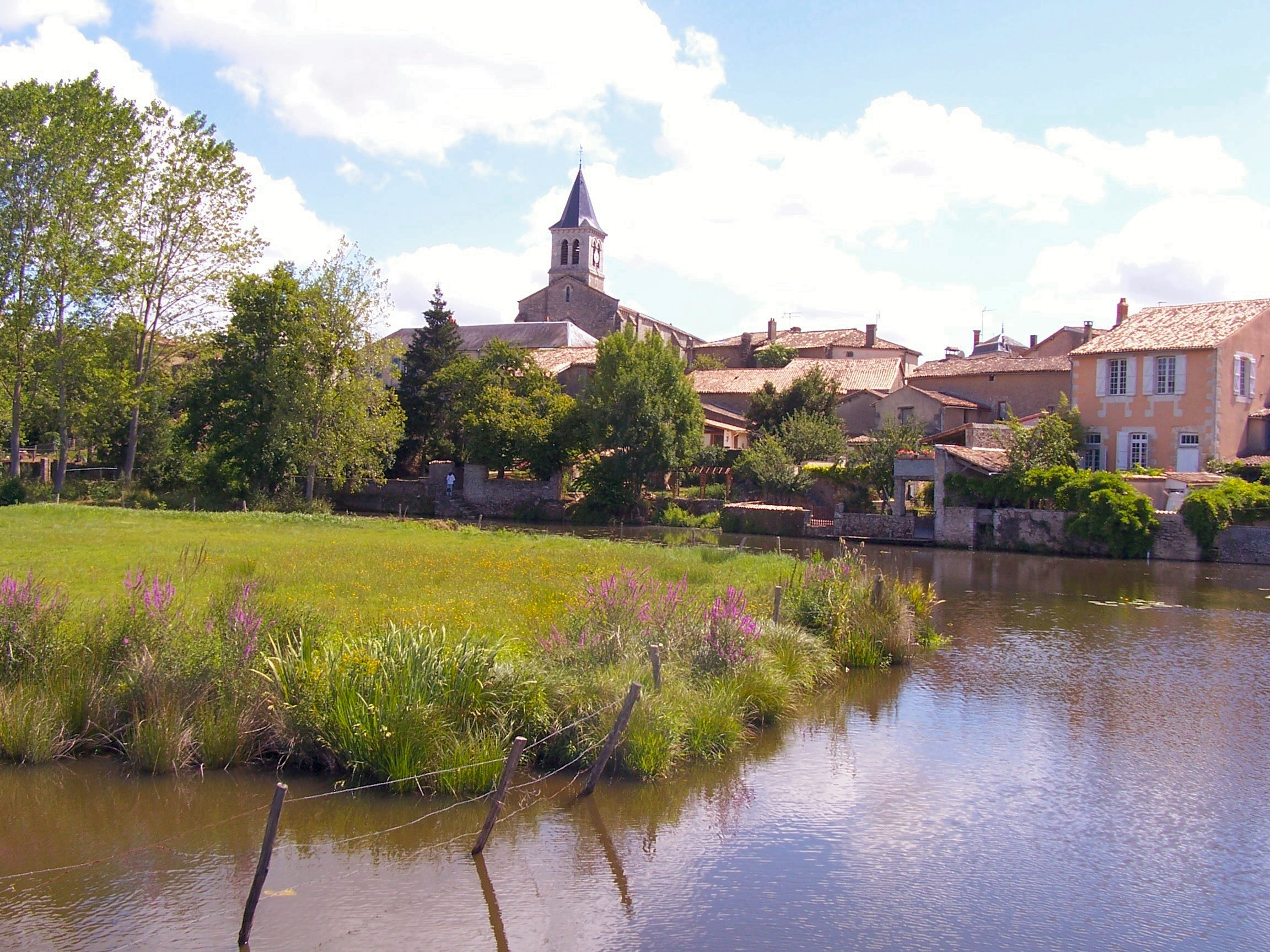 Zicht op het centrum van Sanxay.